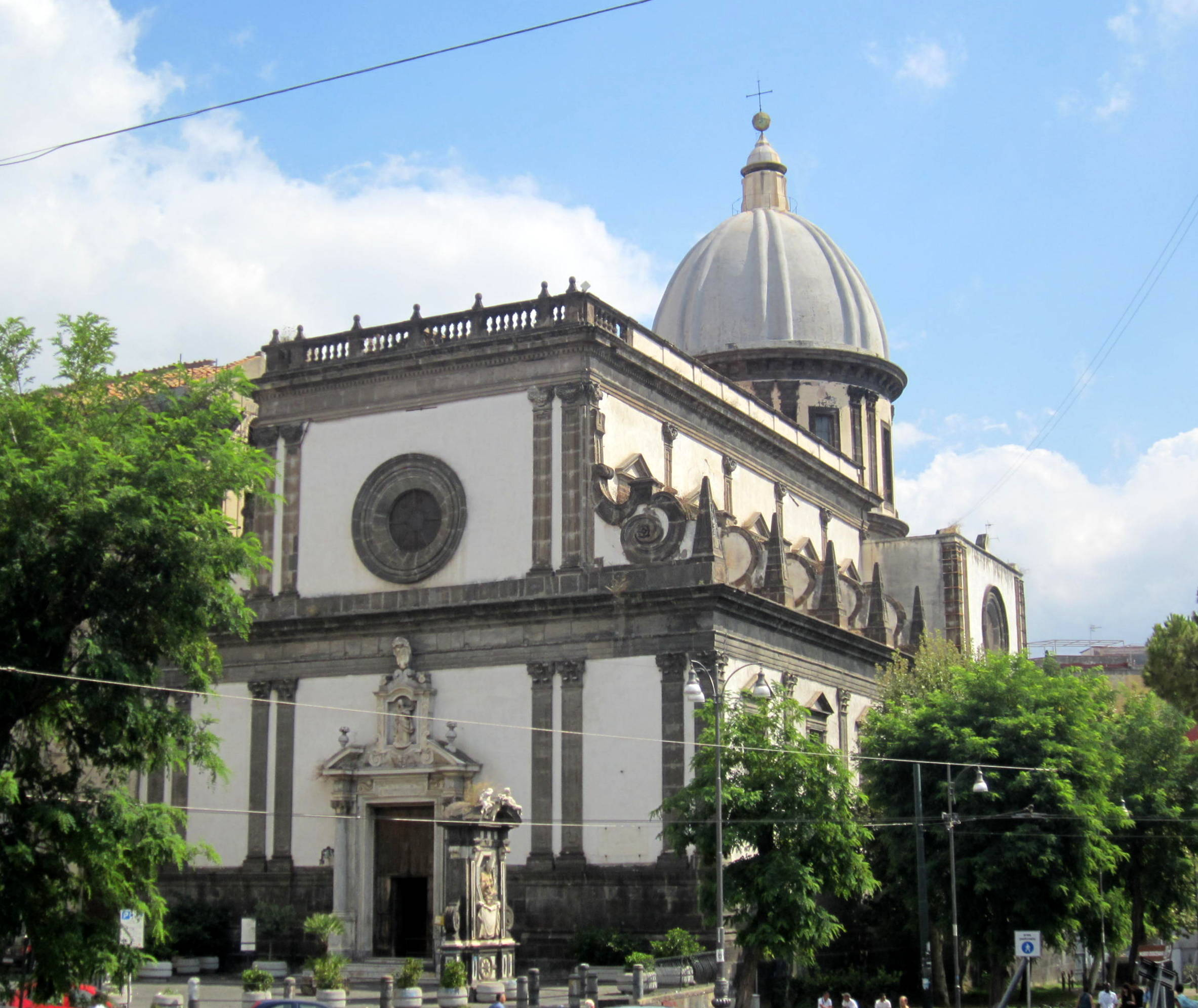 Chiesa di Santa Caterina a Formiello a Napoli